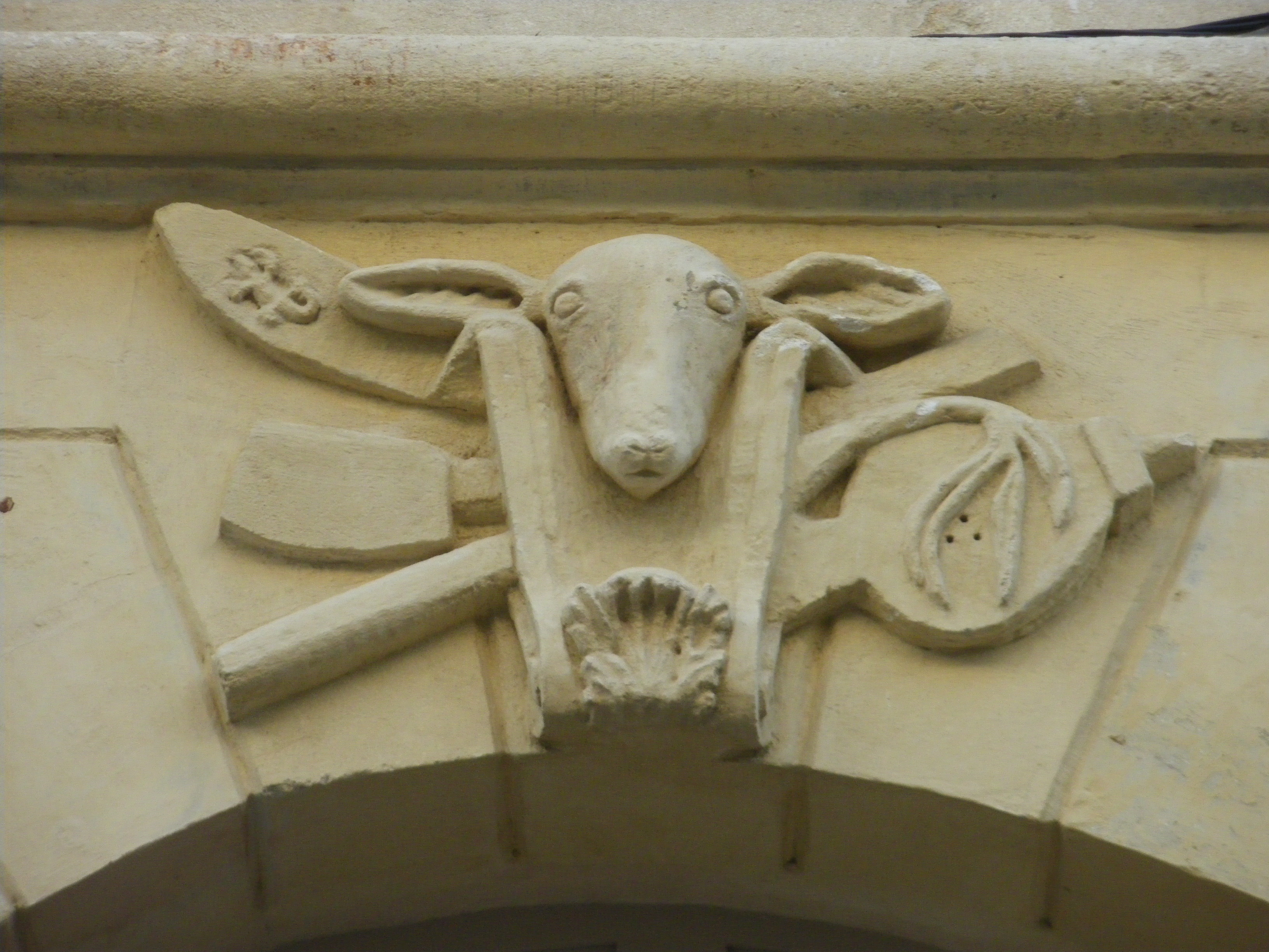 détail de la facade du 22 rue du Vieux Sextier à Avignon, France